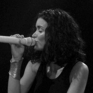 Jenifer Bartoli sur scène, lors d'un Concert à l'Olympia (Paris), en 2005.